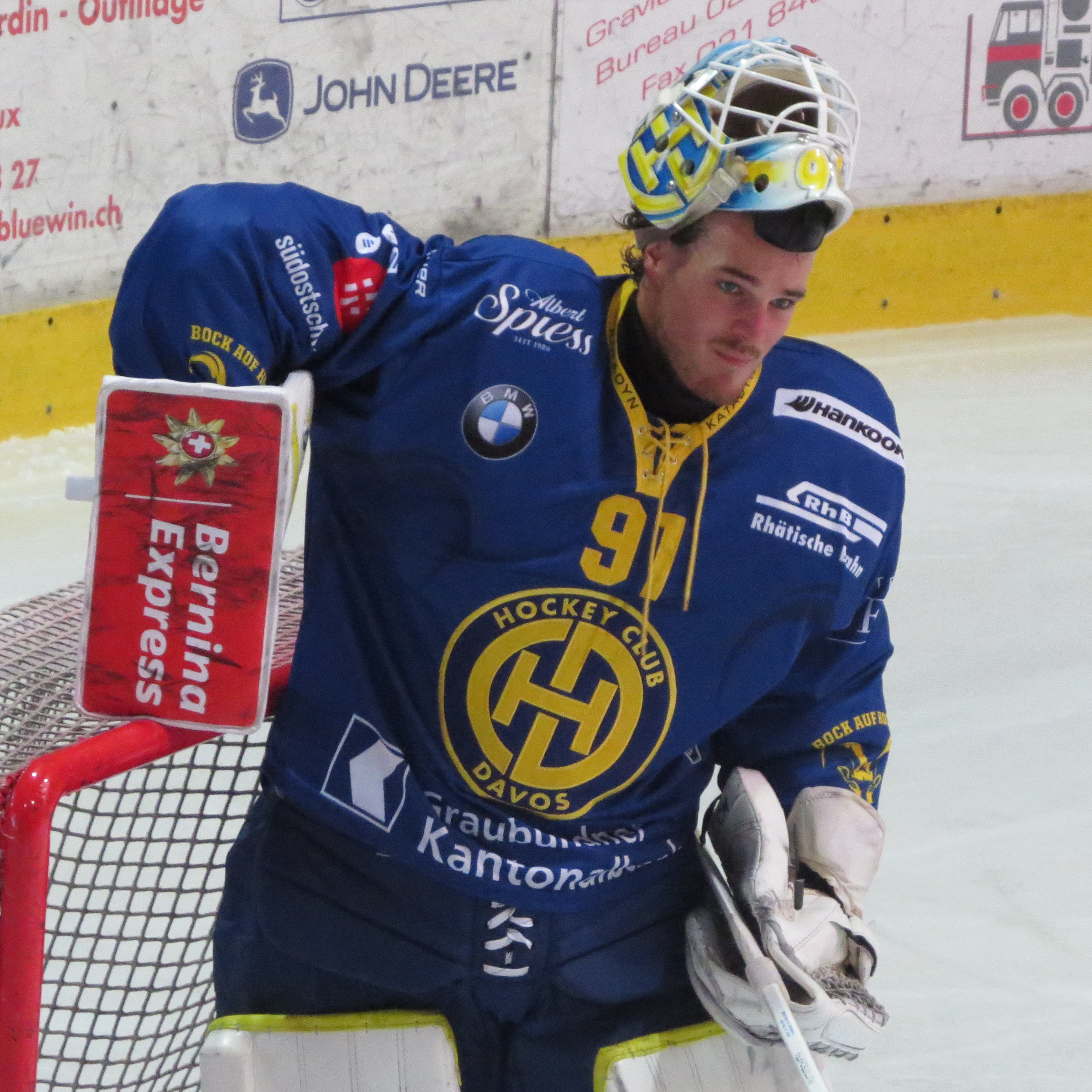 Match entre le CSKA Moscou et HC Davos le 15 août 2018 au Sentier (Hockeyades) 91 : Gilles Senn